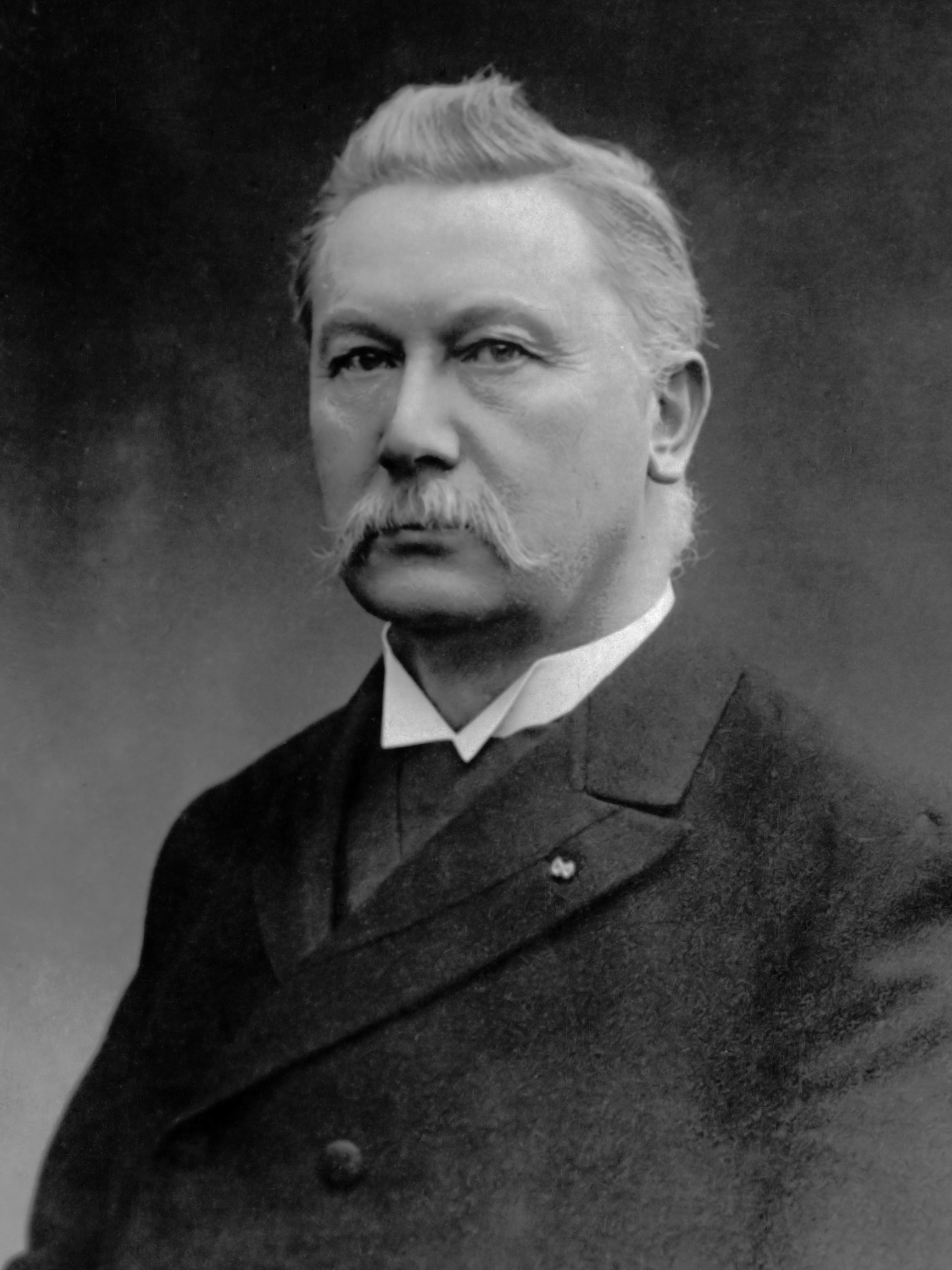 Prof. Poels, directeur van het Rijksserum-inrichting te Rotterdam 1927